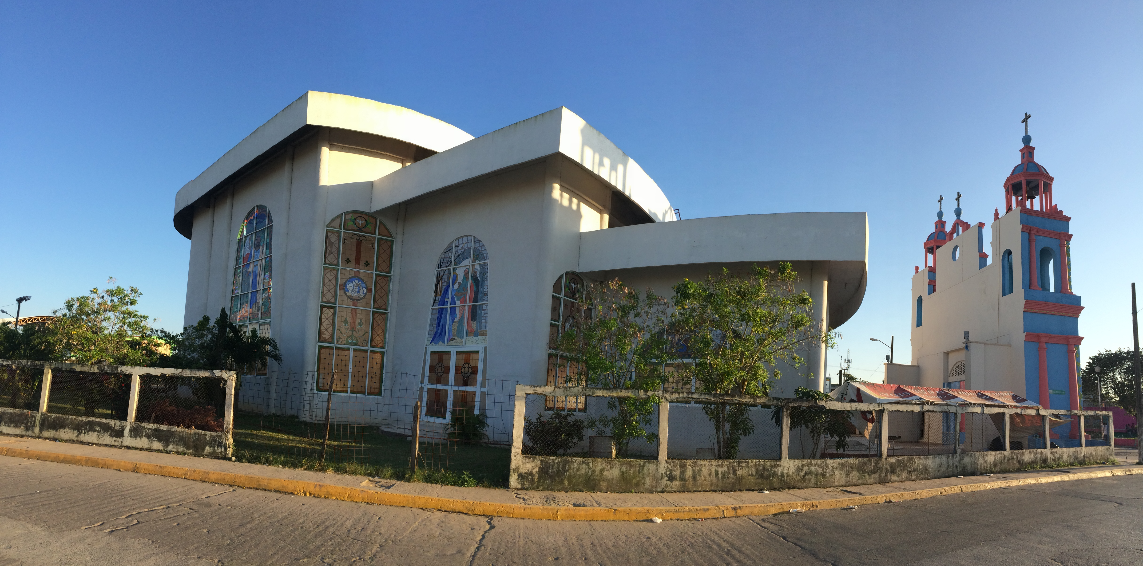 Parroquia de la Virgen de la Natividad Vista Norte